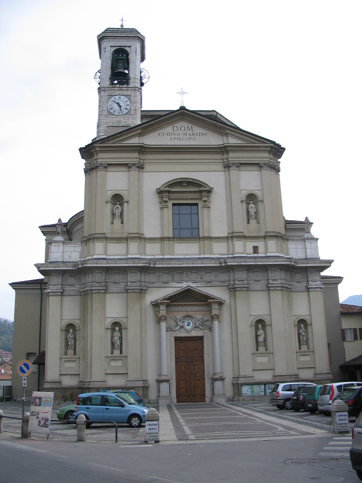 Nembro, Chiesa di San Martino